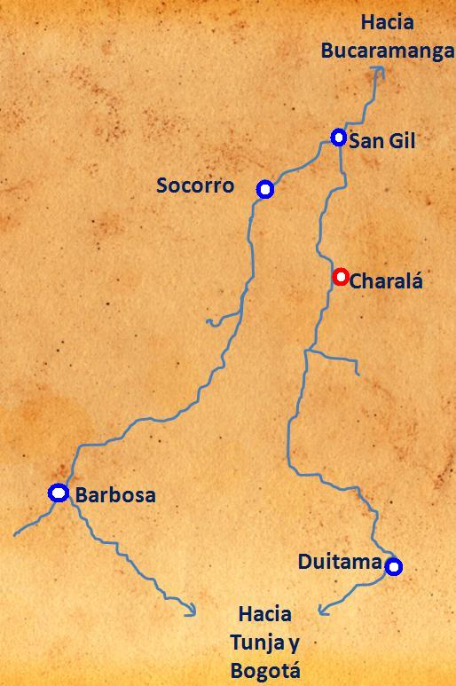 COMO LLEGAR A CHARALA